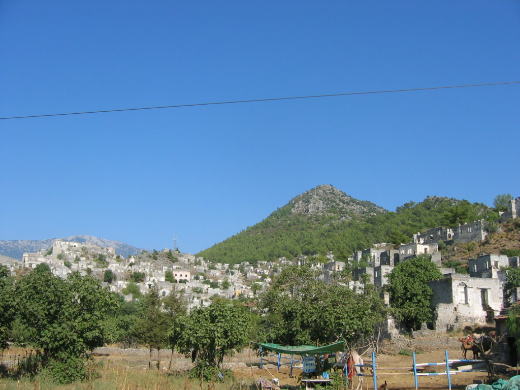 Fethiye'ye bağlı Kayaköy. Evler mübadele sırasında Rumlar tarafından terkedilmiştir.